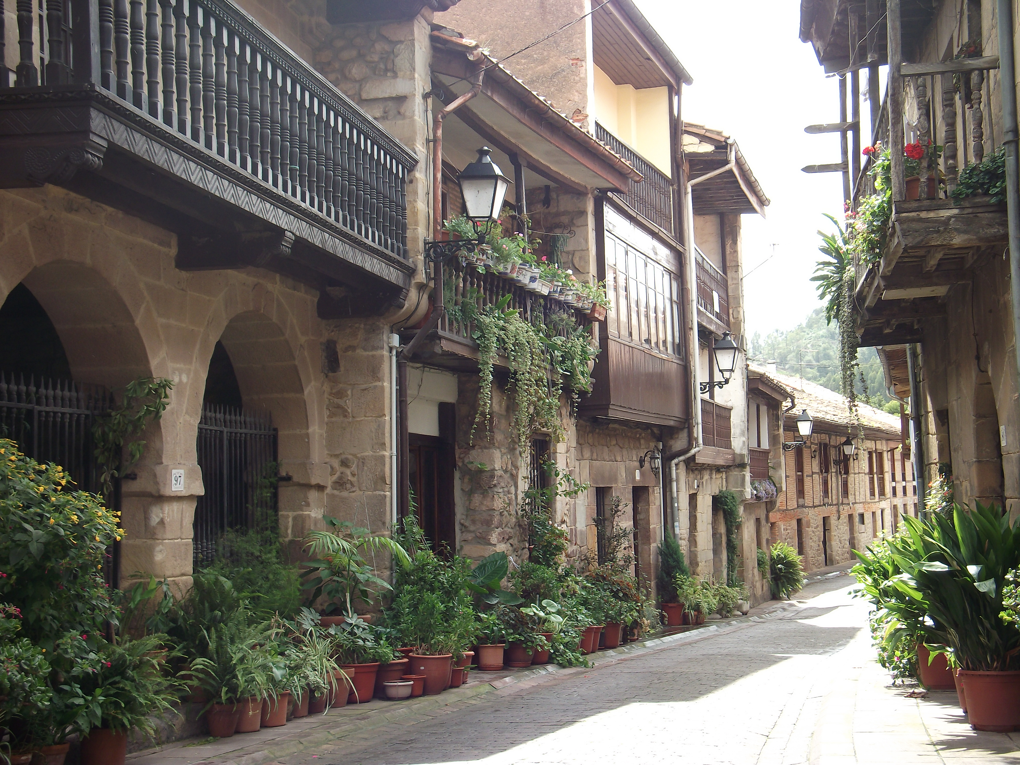 Esta es una fotografía de un monumento declarado en el registro de Bienes de Interés Cultural del patrimonio español con el código RI-53-0000332